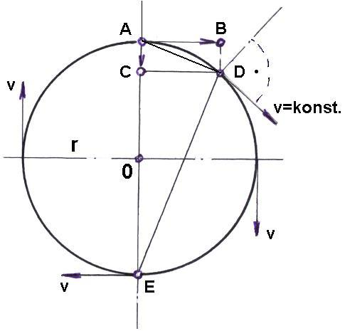 Centrifugalna sila1